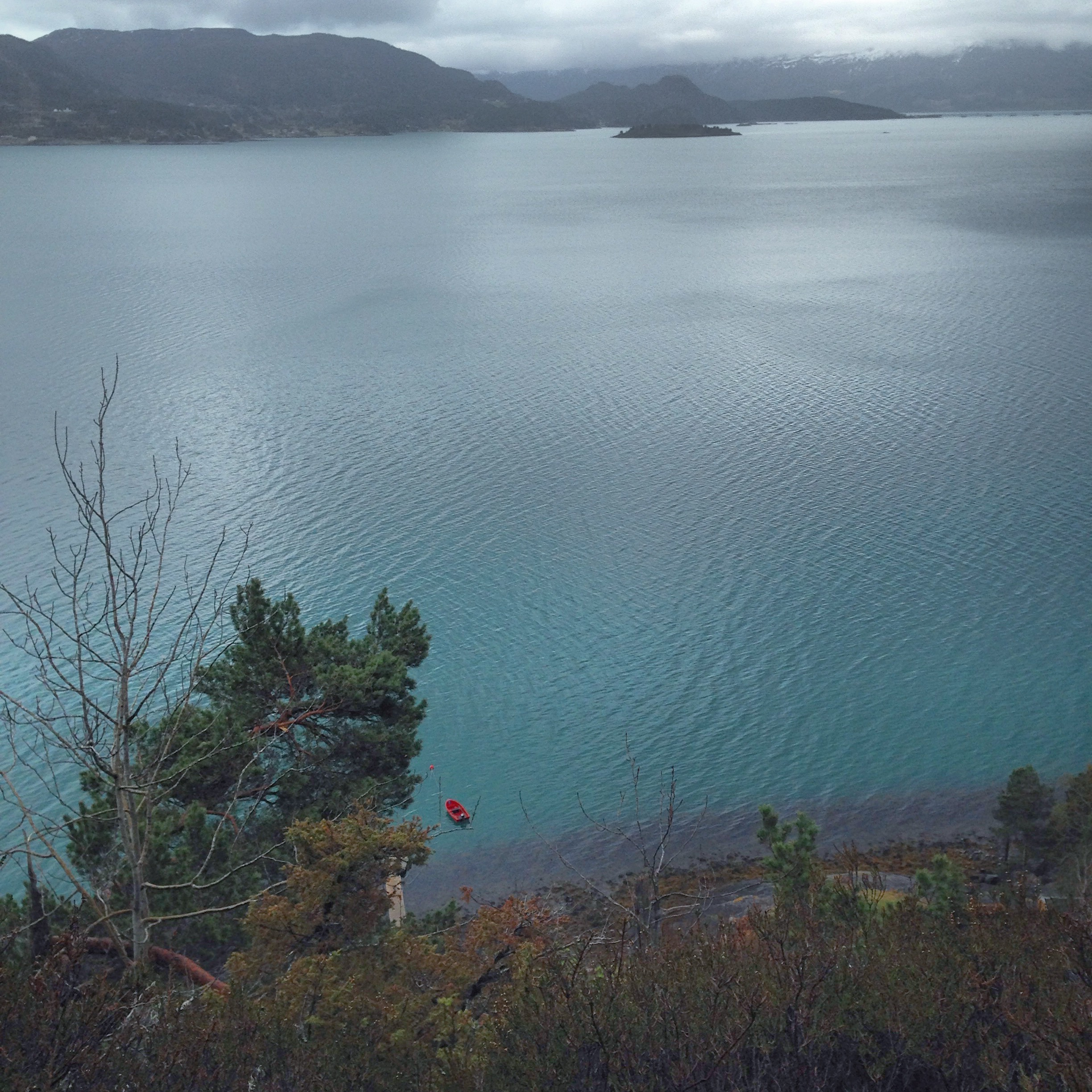 Freifjorden